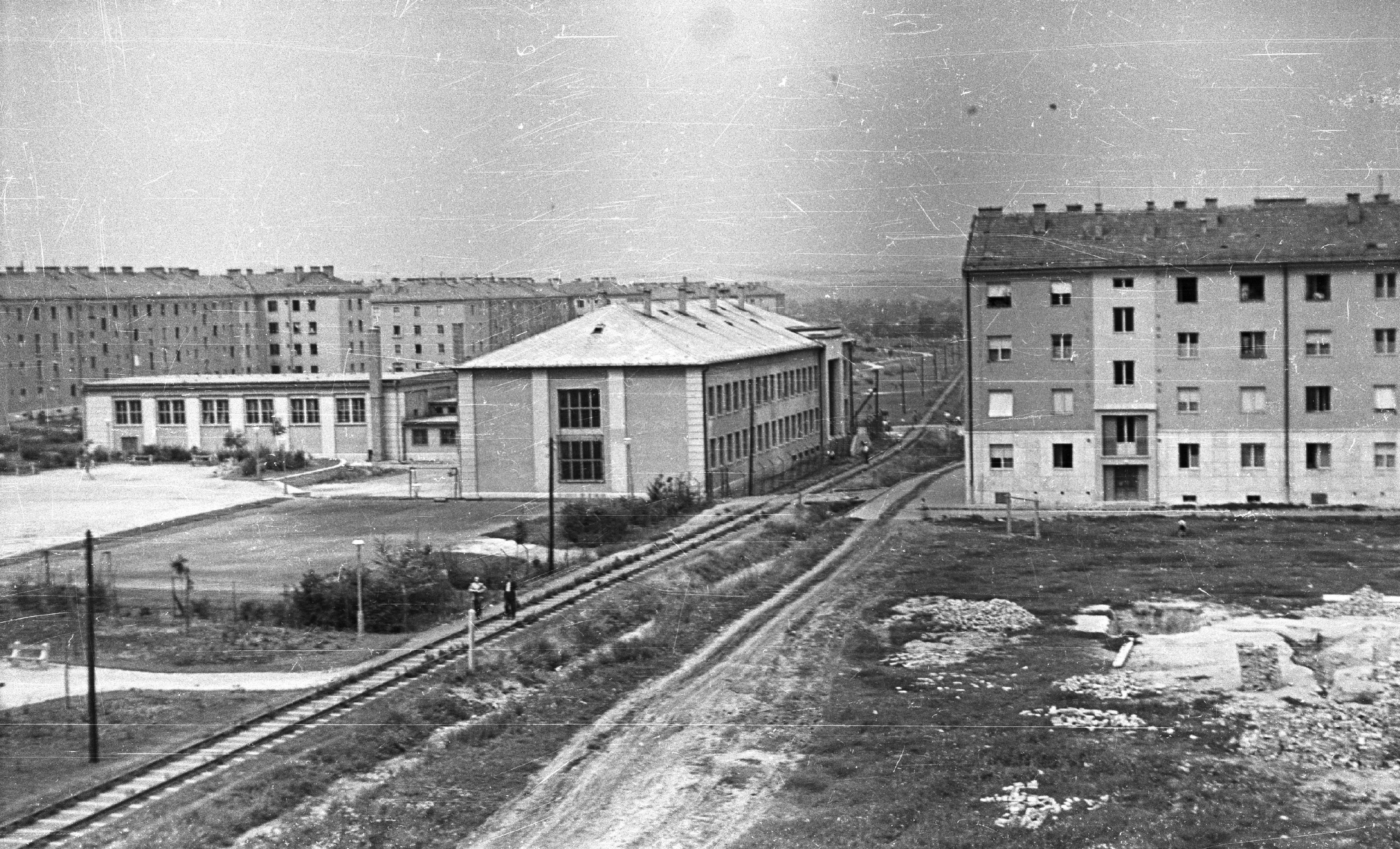 balra az Építők útja, jobbra a Rákóczi tér házainak hátsó homlokzata. Location: Hungary Title: balra az Építők útja, jobbra a Rákóczi tér házainak hátsó homlokzata.